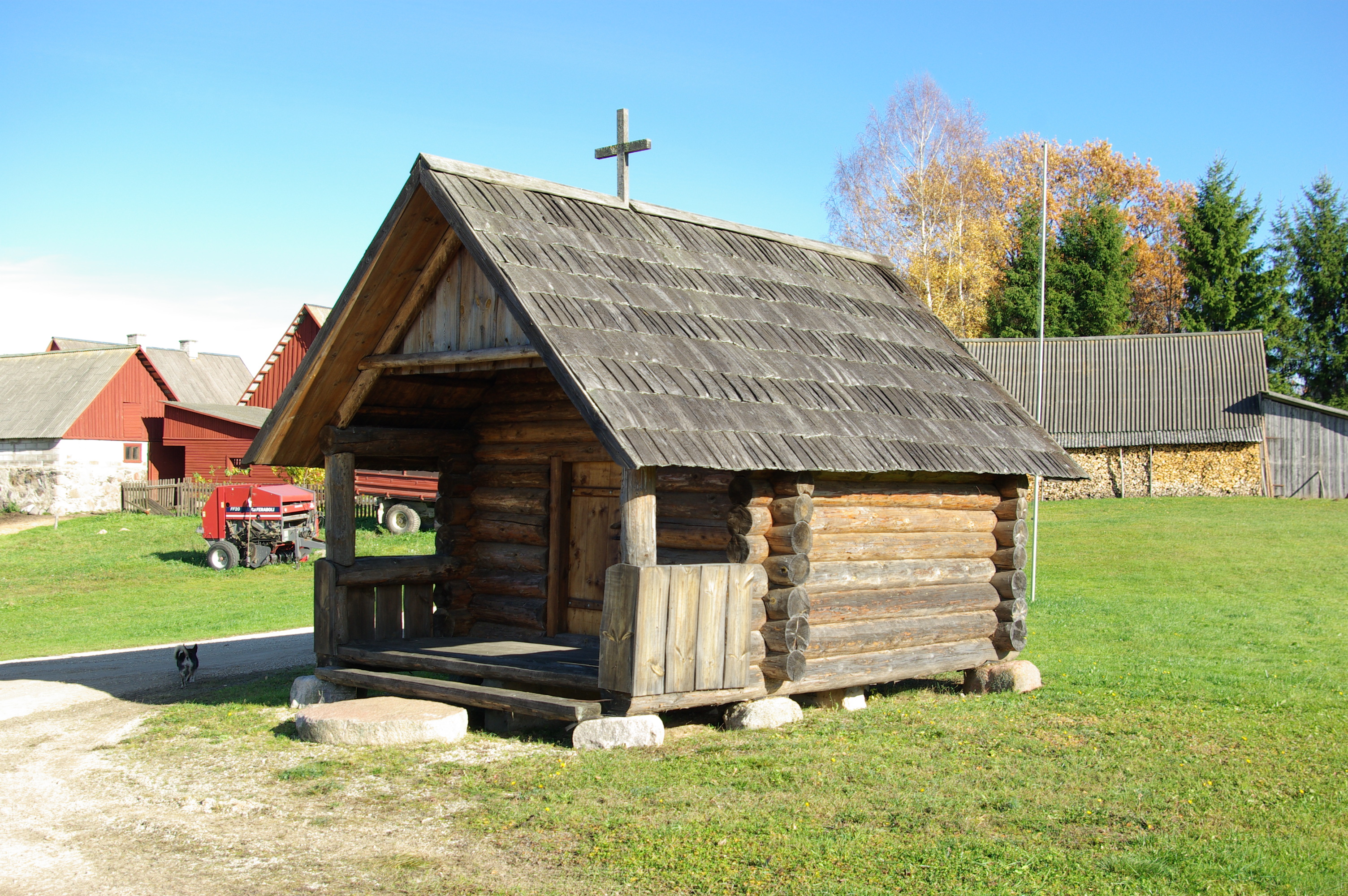 Kuige tsässon